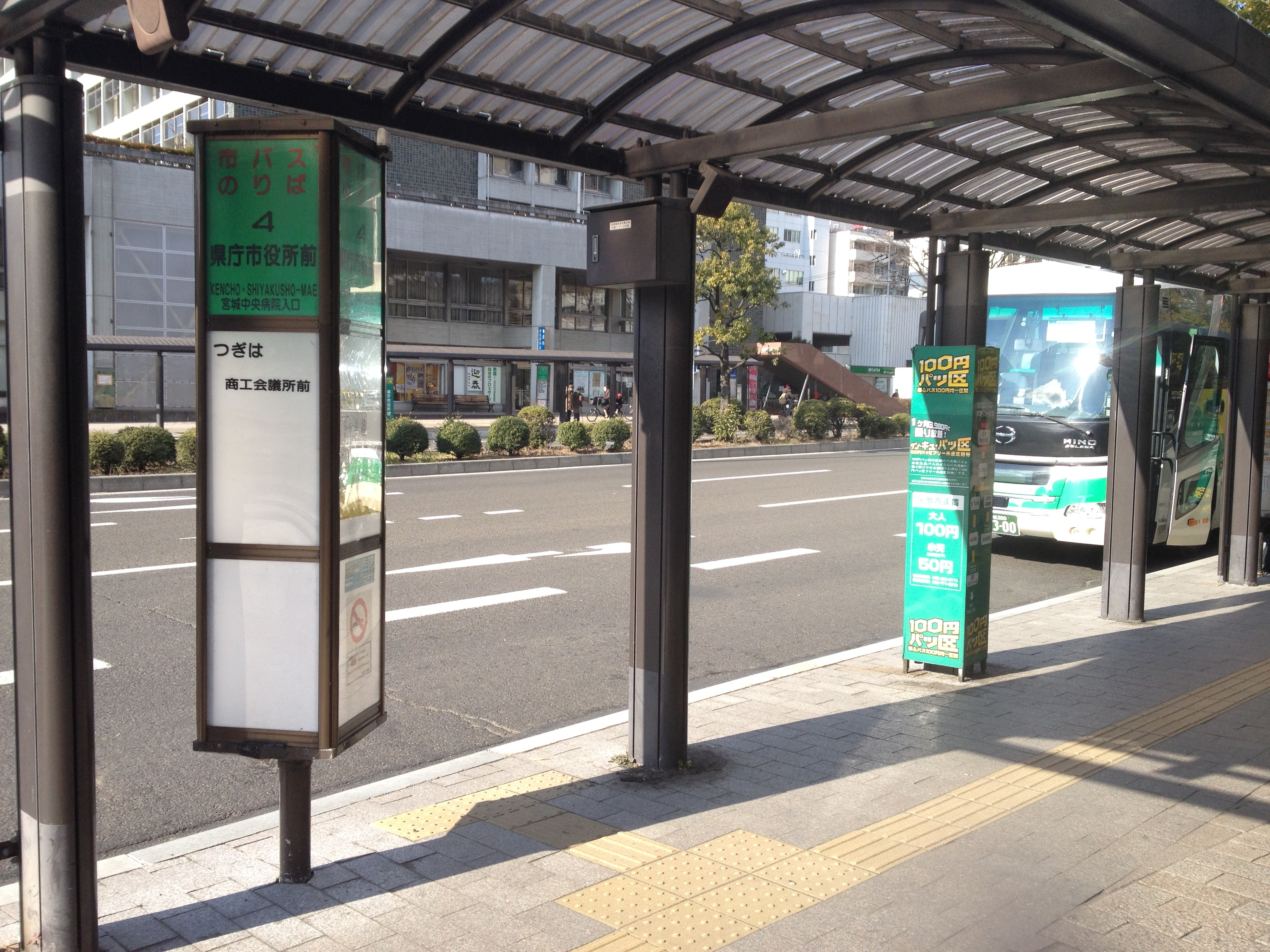 仙台市営バス・バス停（県庁市役所前）